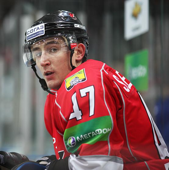 Нападающий новокузнецкого «Металлурга» Антон Слепышев во время матча чемпионата КХЛ против братиславского «Слована» 2 декабря 2012 года.